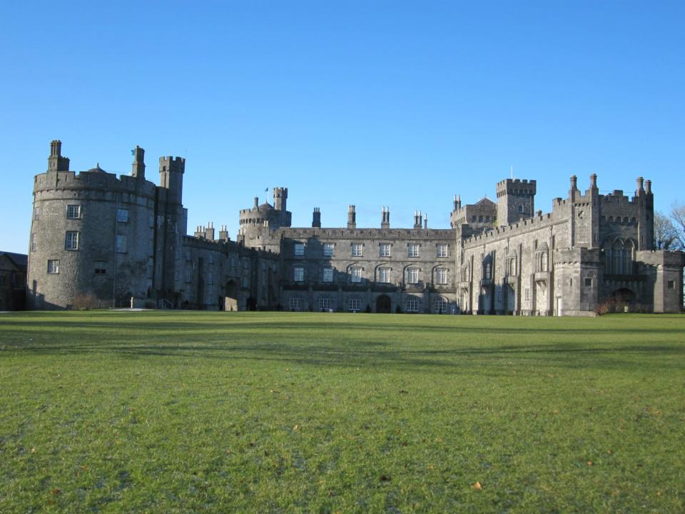 킬케니캐슬